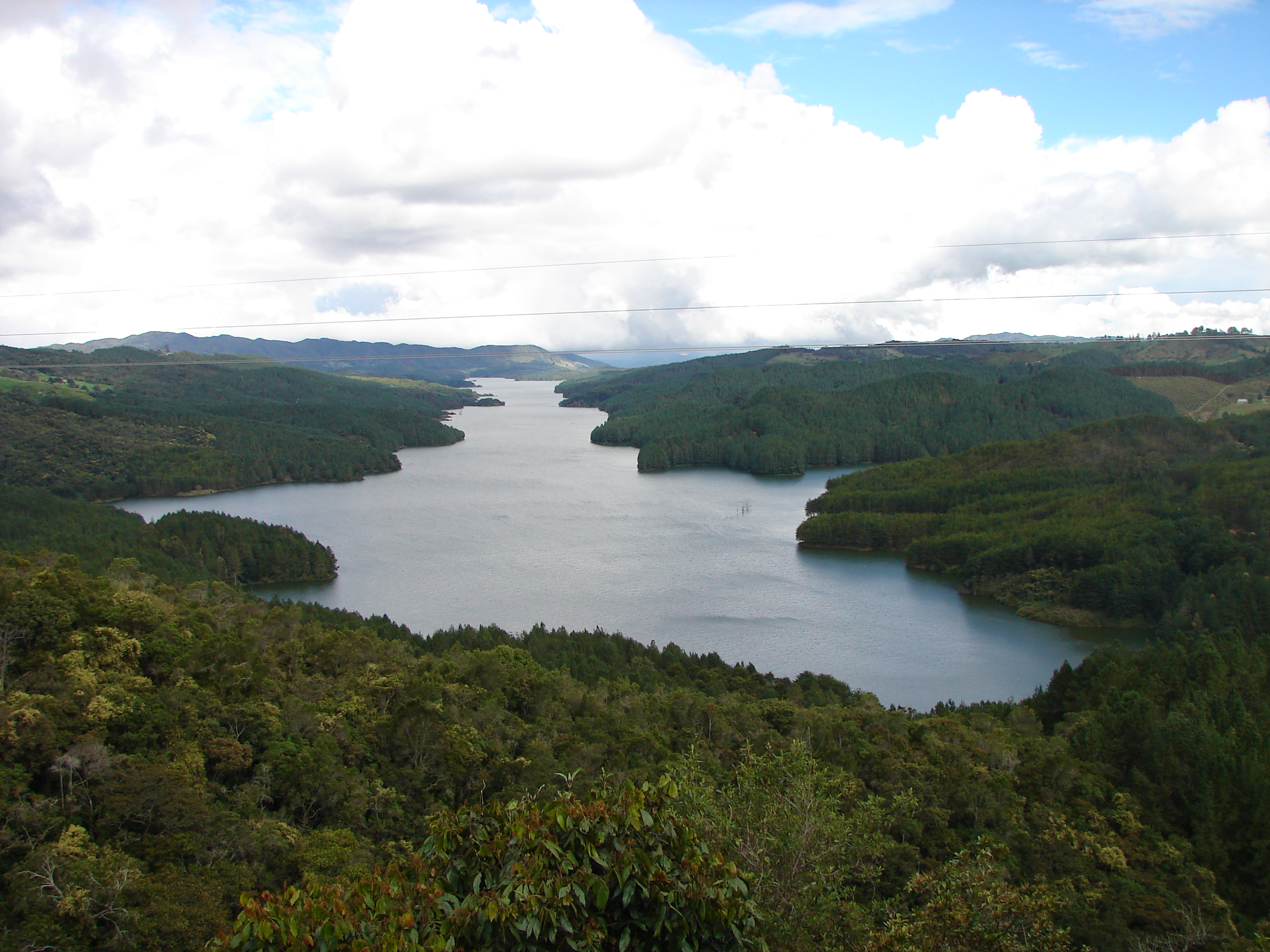 embalse riogrande 2 ubicado en el norte de antioquia, colombia